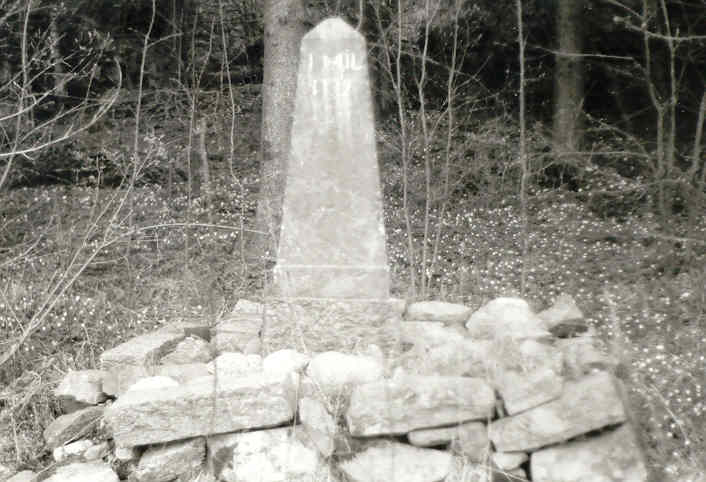 Milsten i Motala kommun från år 1772 (?), våren 1992. En bild tagen av Harri Blomberg.